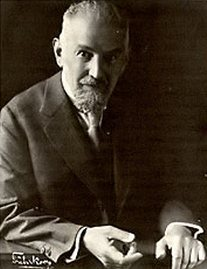 Немецкий психолог и философ-персоналист Вильям Штерн (1871-1938)